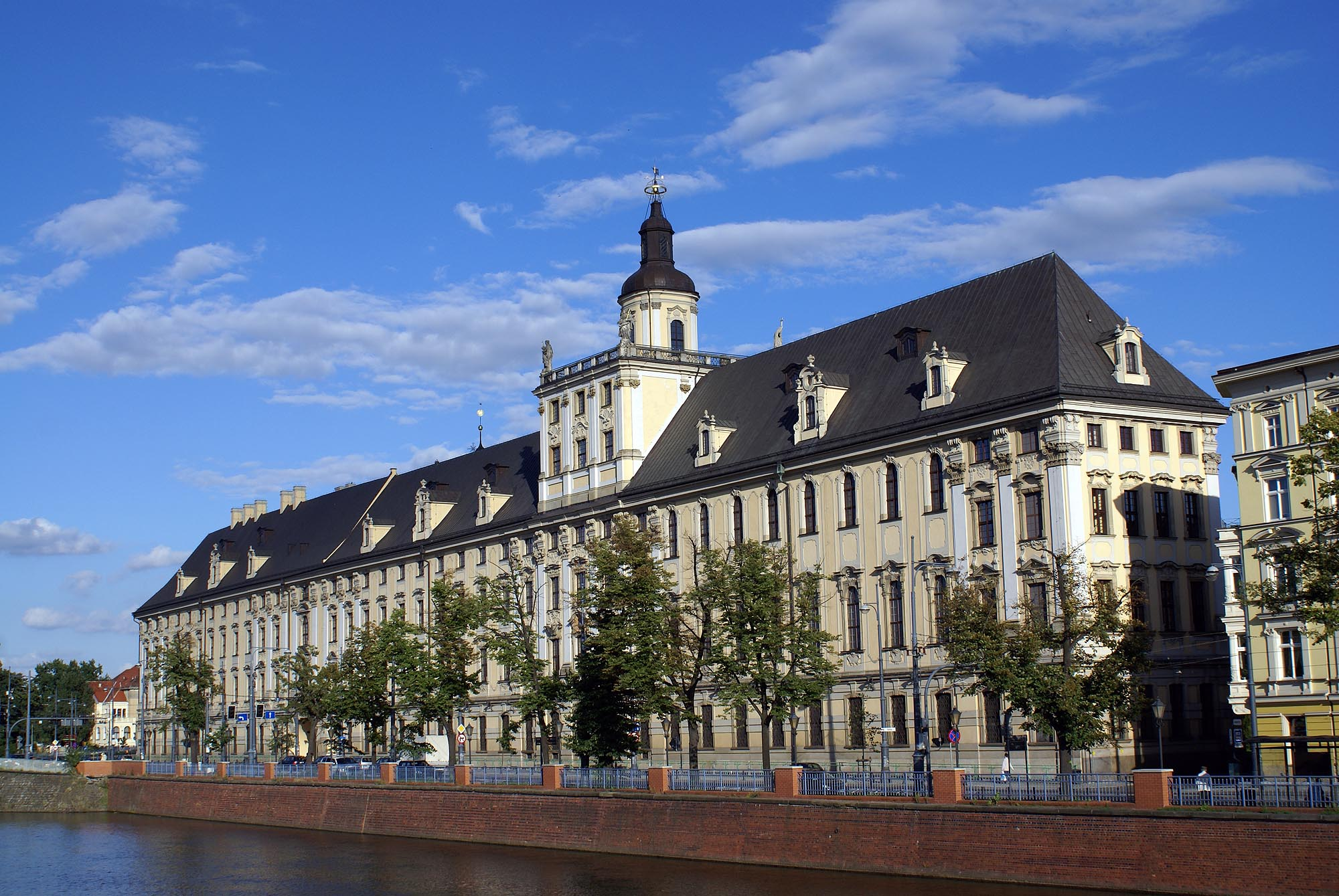 Wrocław, kolegium jezuickie, ob. Uniwersytet Wrocławski